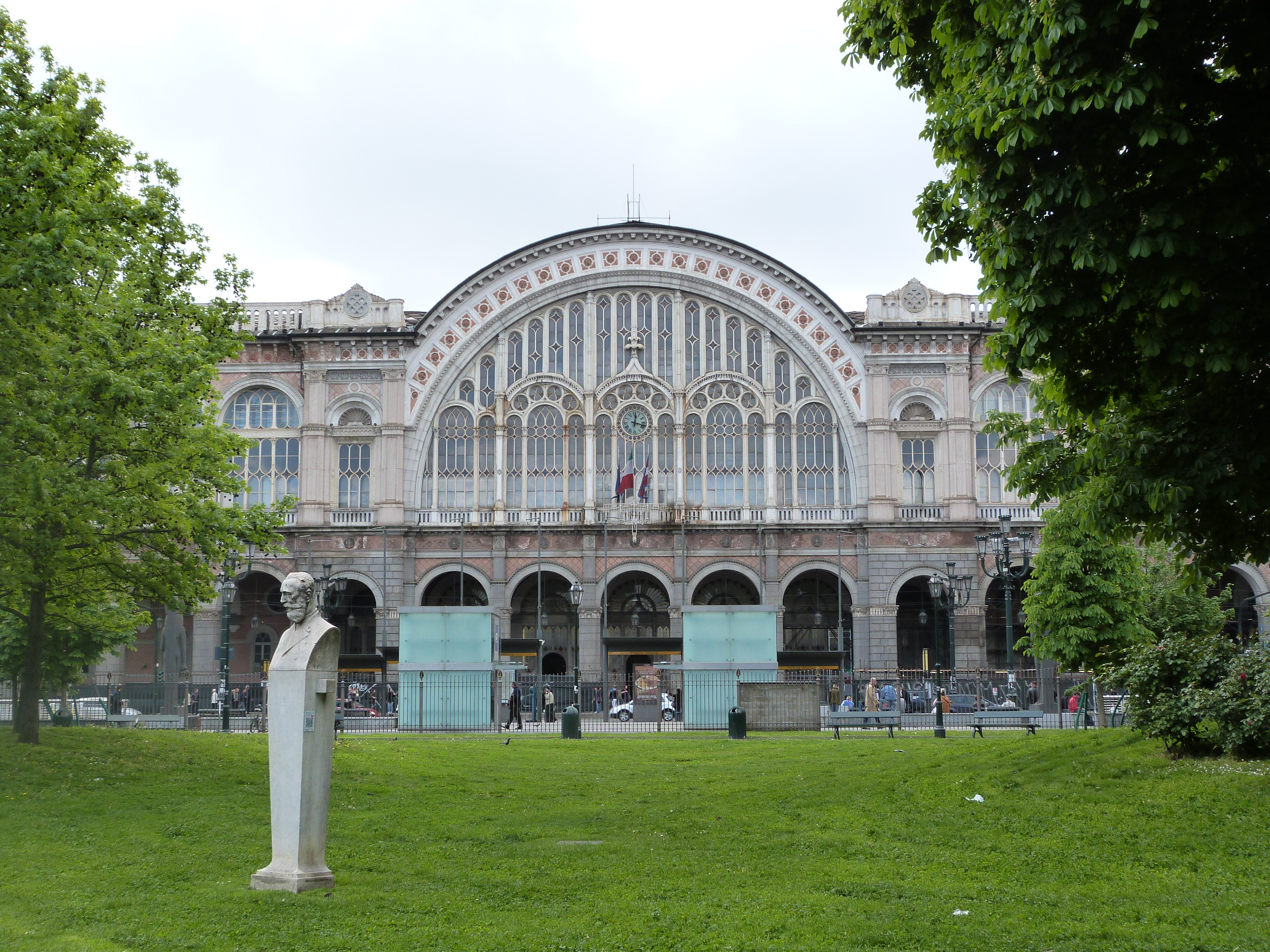 La stazione di Porta Nuova vista da Piazza Carlo Felice